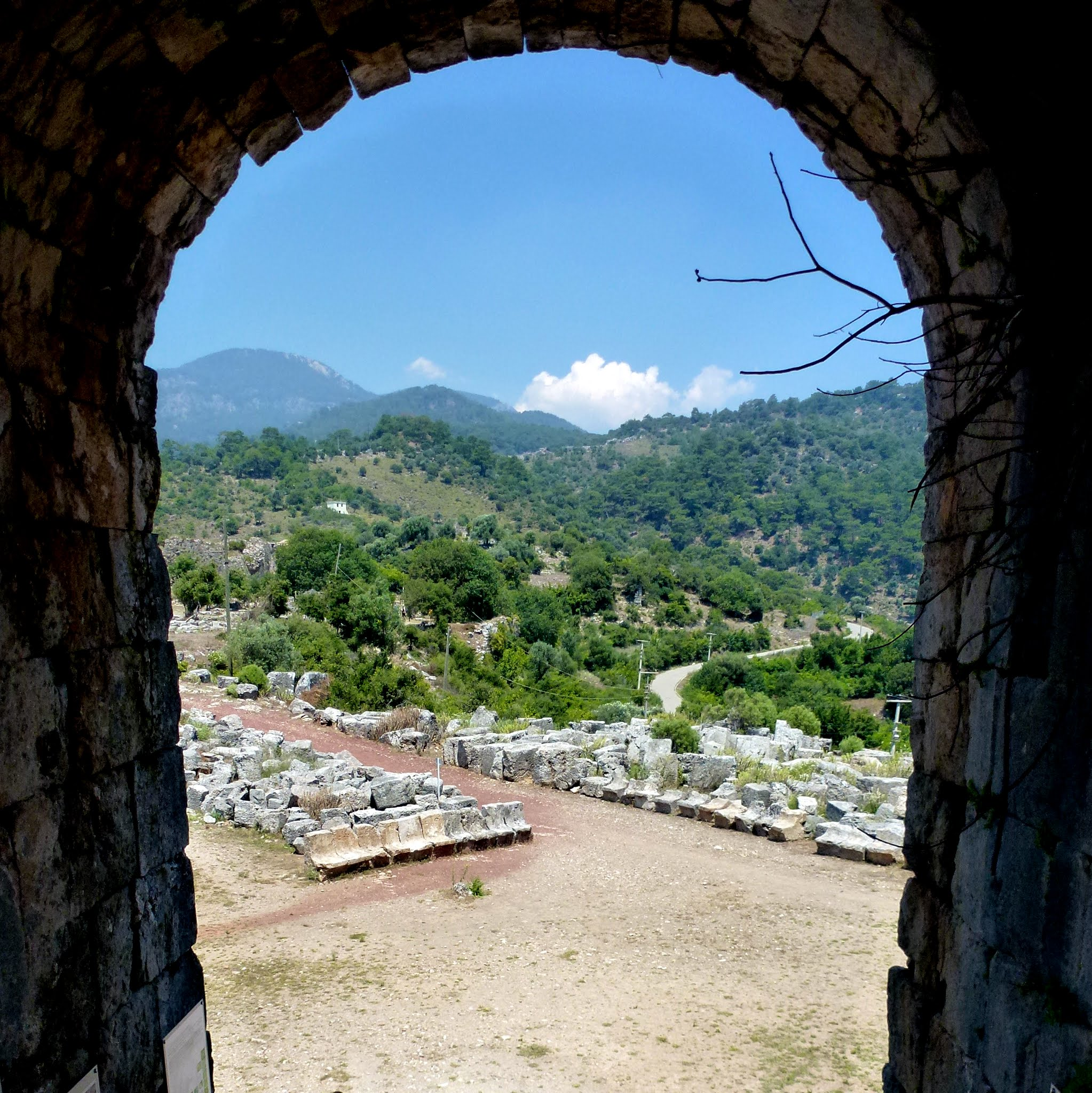 Kaunos